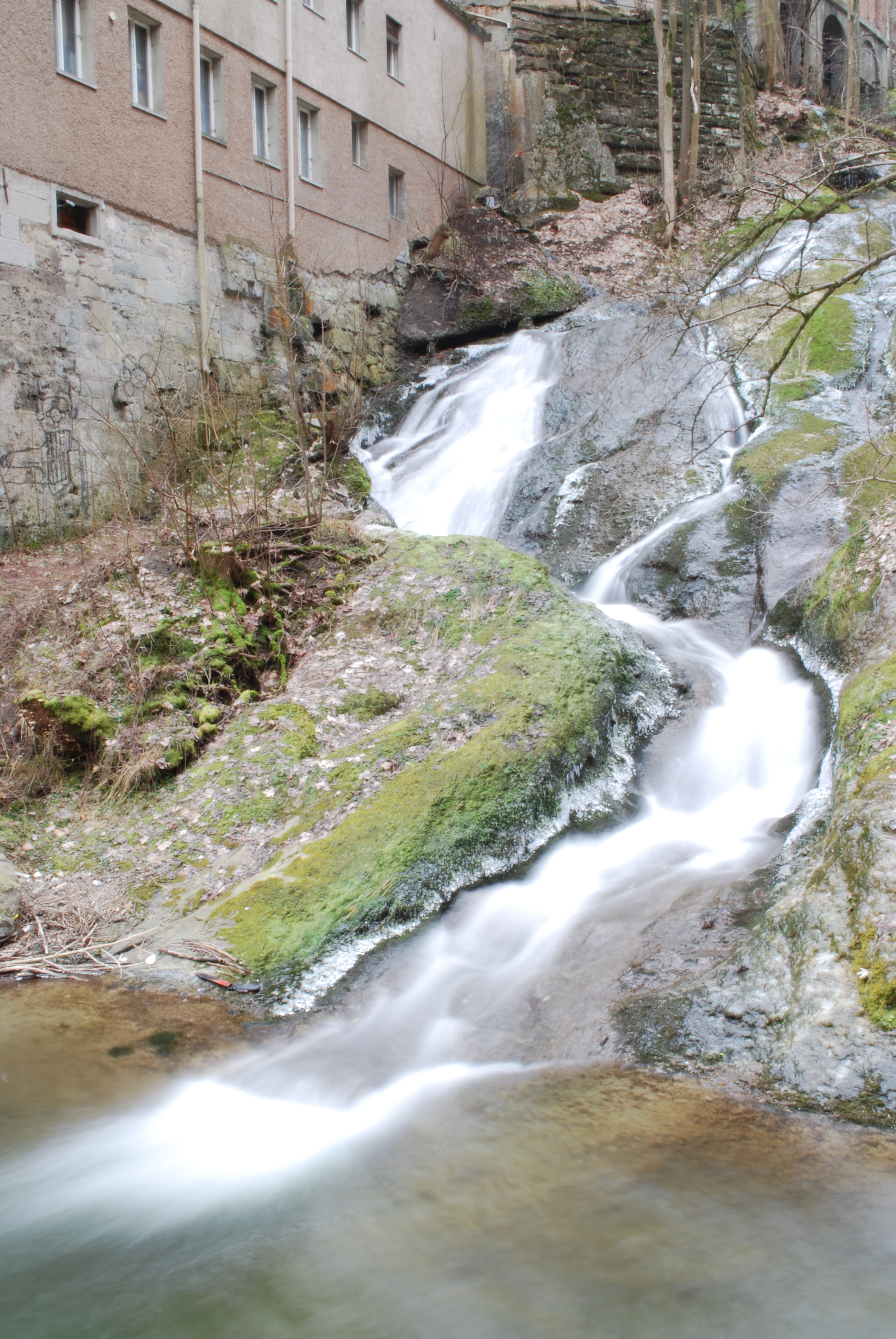 Die Steinach in der Mühleggschlucht, oberhalb des Klosters St. Gallen